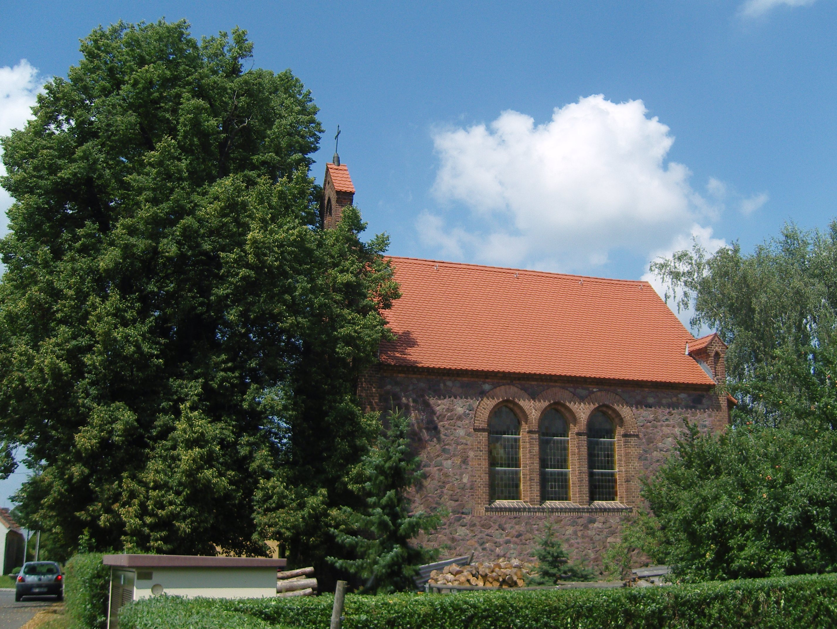 Dorfkirche in Allmosen ein Ortsteil von Großräschen. Die Kirche gehört zu den Baudenkmälern der Stadt Großräschen, die Linden vor der Kirche sind ebenfalls geschützt